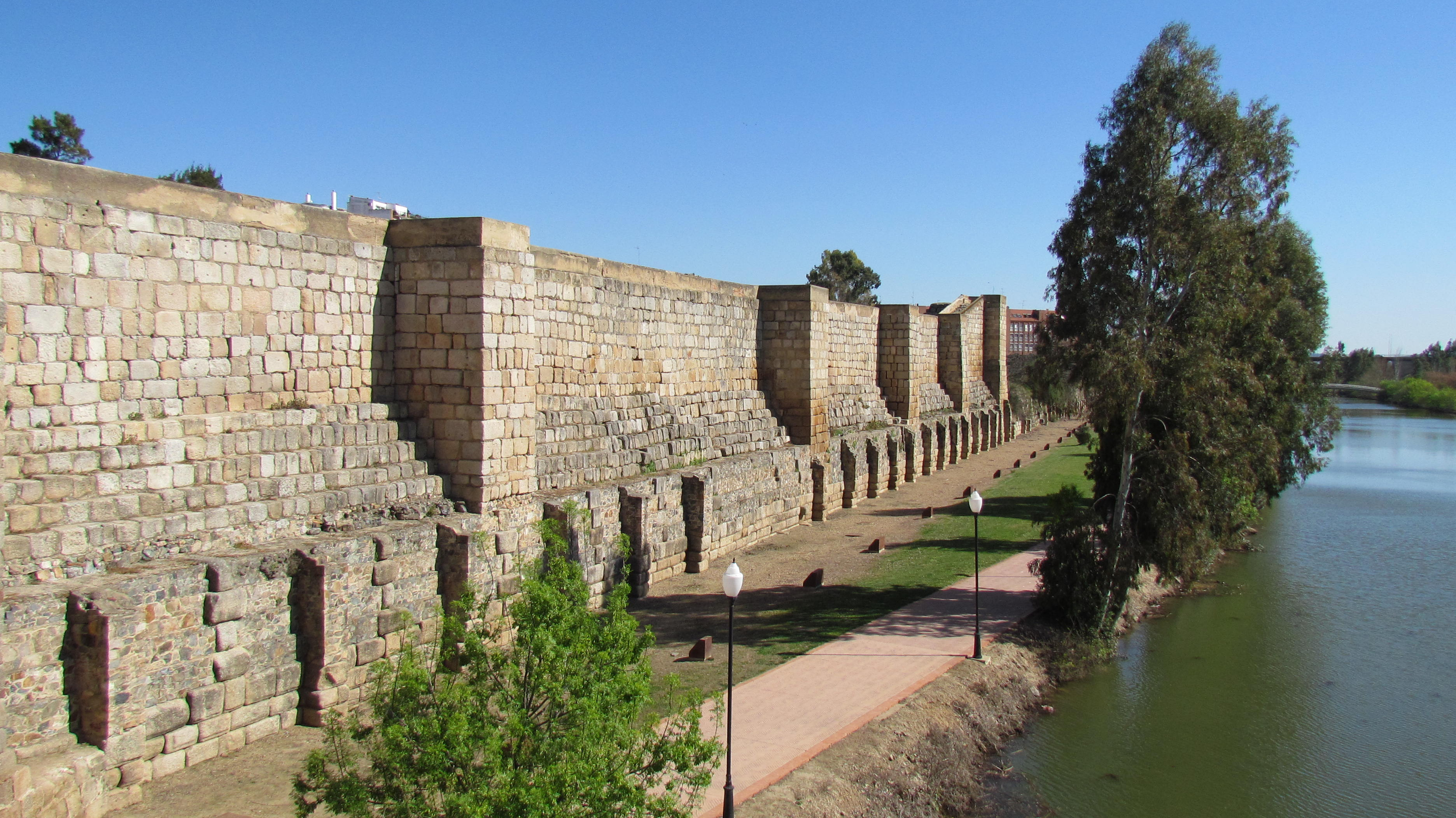 Alcazaba v Meridi, Španija, ki jo je okoli leta 835 zgradil kordovski emir Abd Al Rahman II.